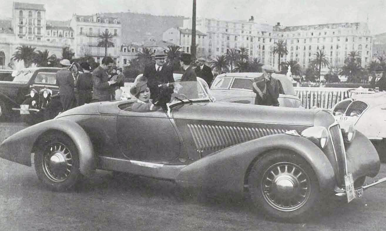 Mme Roux à l'arrivée du Rallye Féminin Paris - Saint-Raphaël en 1934 au volant d'une Amilcar Racer